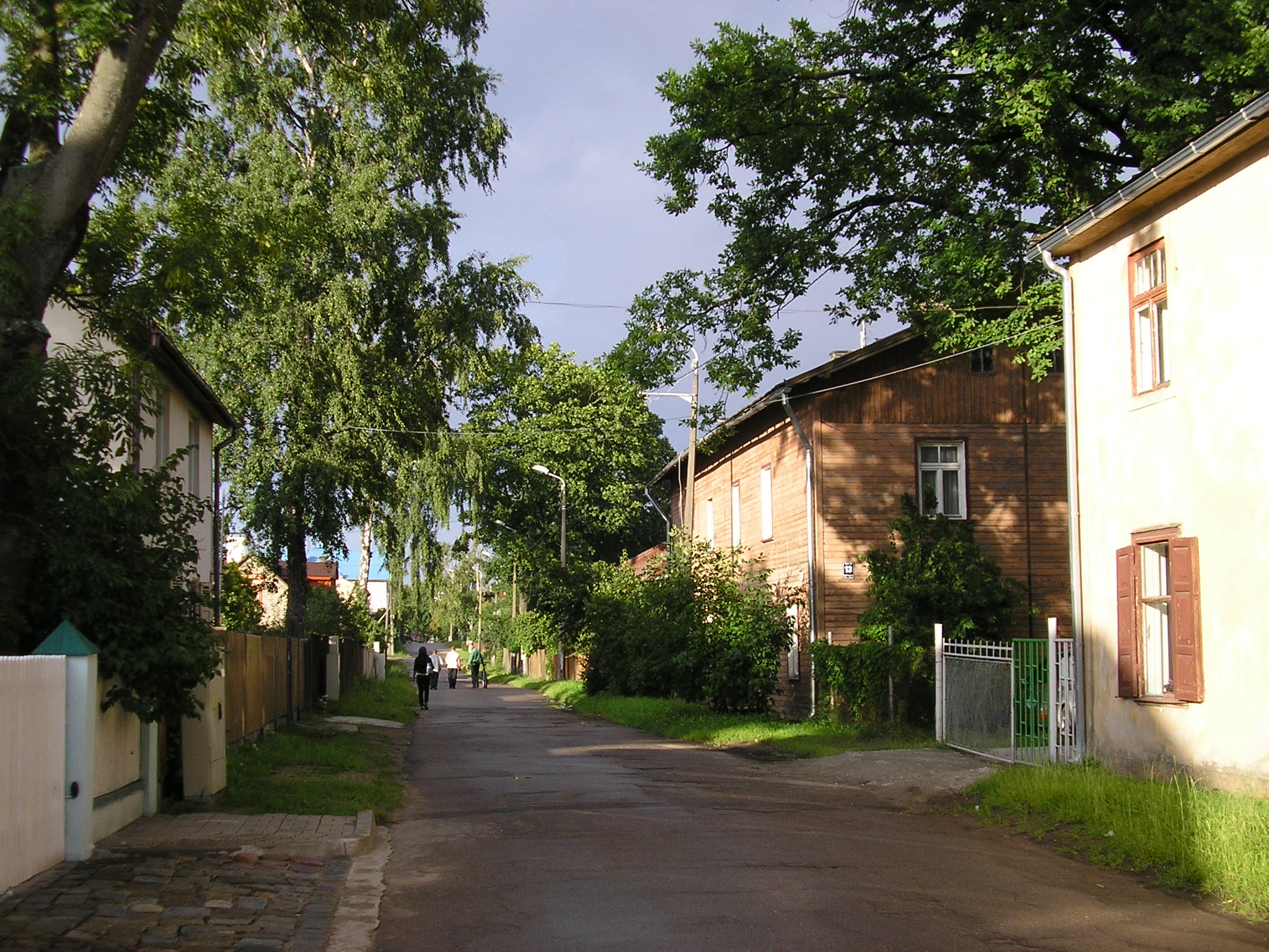 Bolderāja, 2011